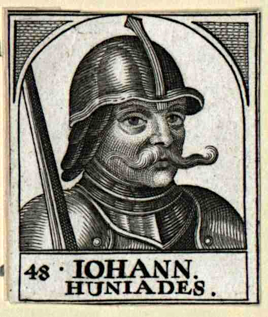 Iohann Huniades Hunyady, János (um 1385 - 1456)